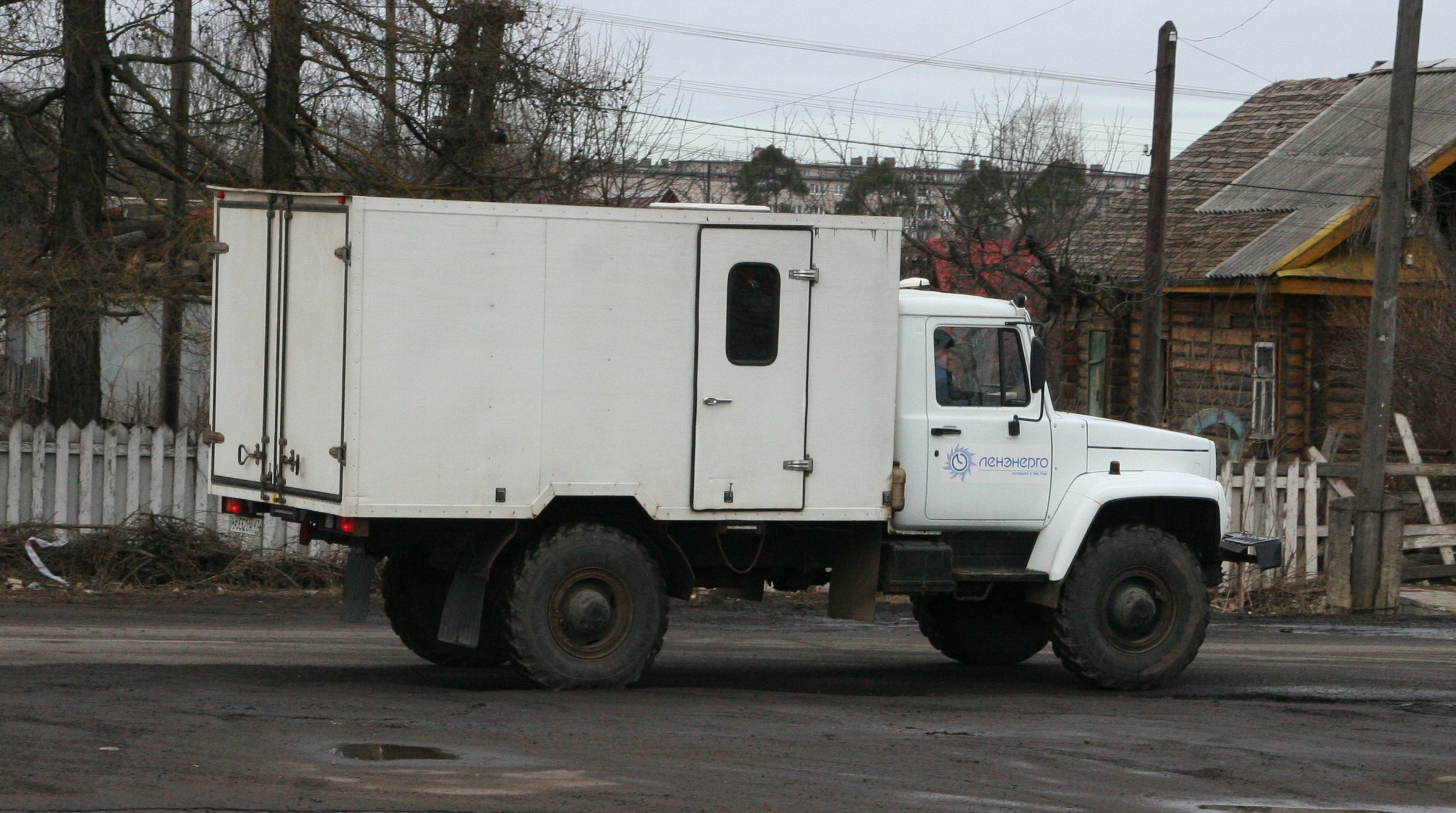 Ein GAZ-3308 130km von St. Petersburg im nördlichen Russland